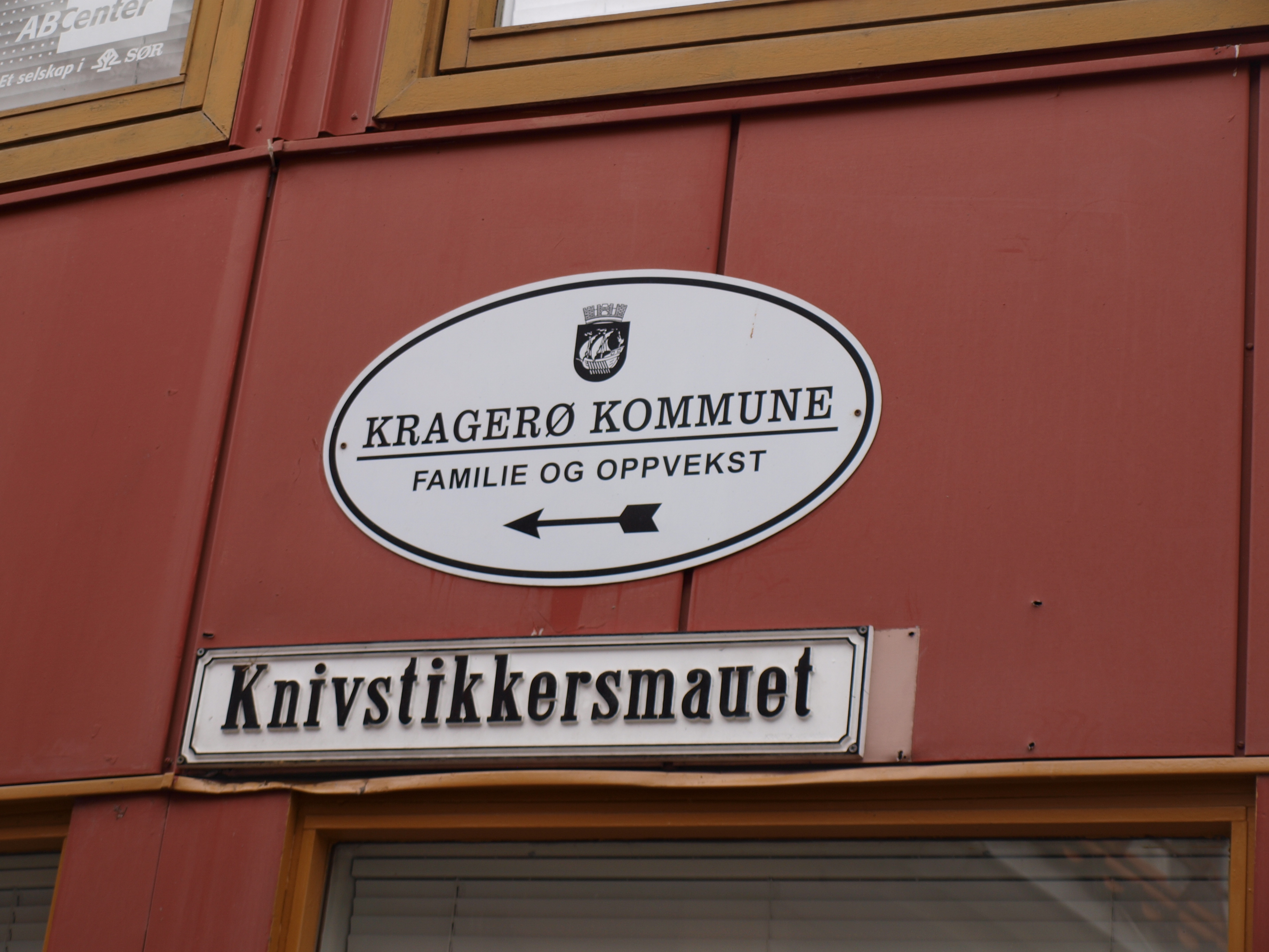 Knivstikkersmauet i Kragerø.